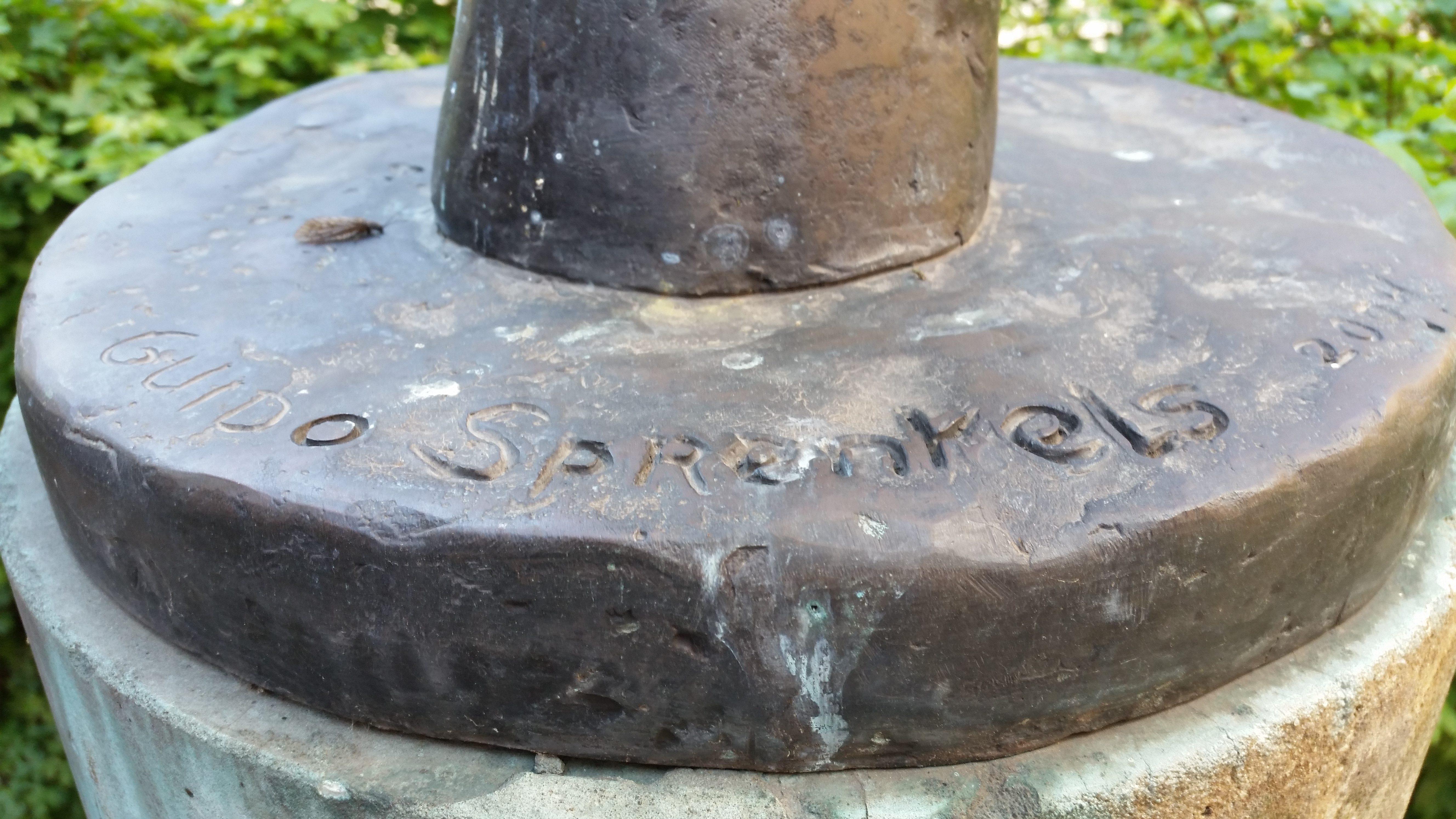 Impressie van Nike aan het Abcouderpad, Amsterdam-Zuidoost van Guido Sprenkels